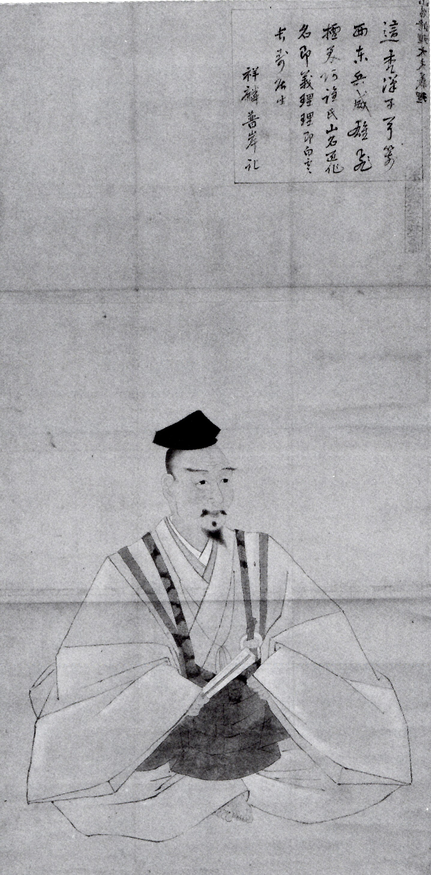 山名義理の肖像。